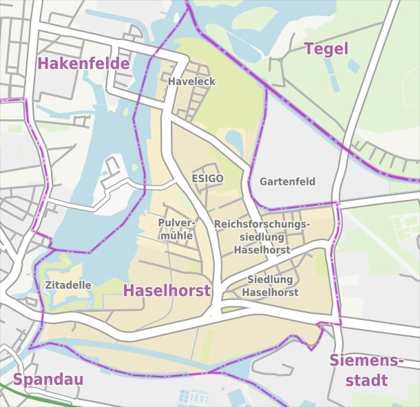 Übersichtskarte der Straßen und Ortslagen in Berlin-Haselhorst